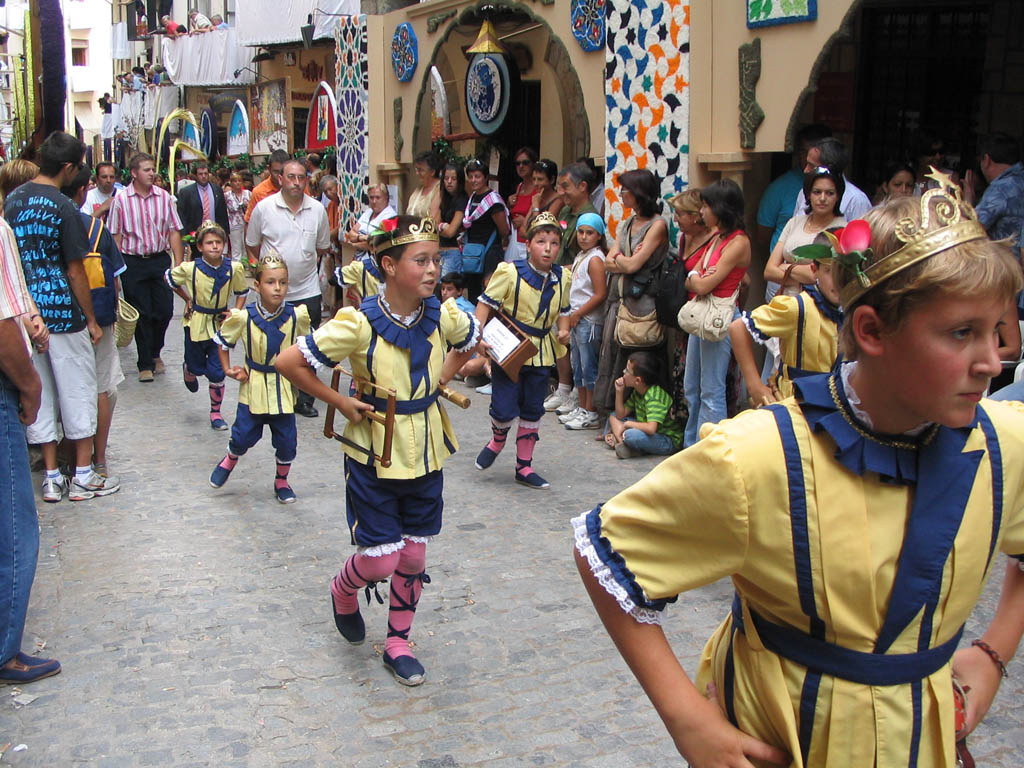 Arts i Oficis en el Sexenni de Morella de 2006 (Els Ports)